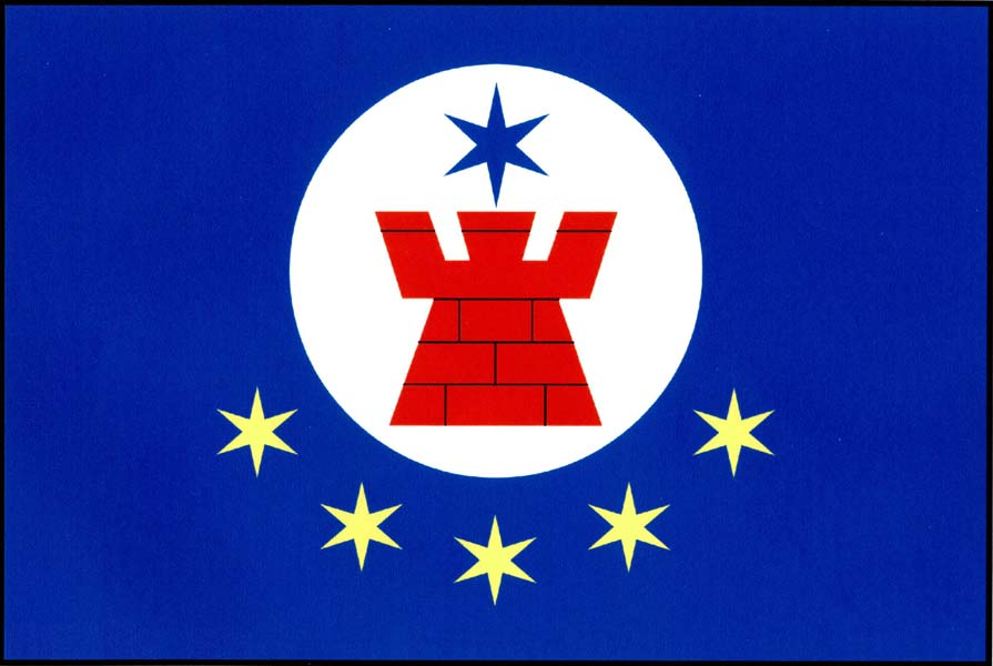 Vlajka obce bezděkov (okres Klatovy)